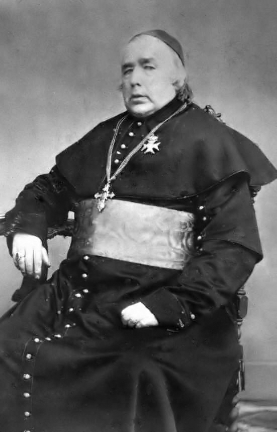 Johannes Zwijsen (1794-1877) first archbishop of Utrecht